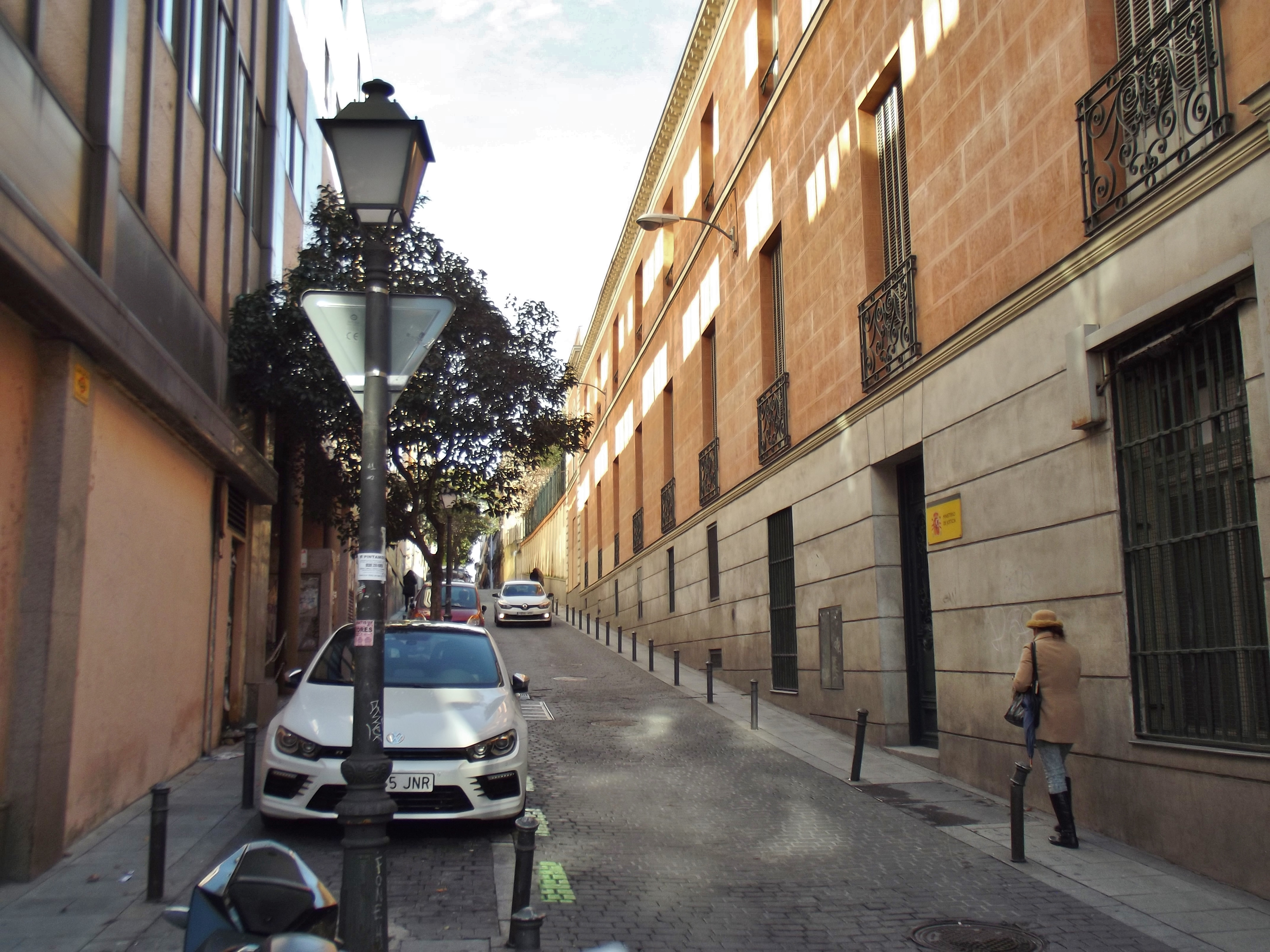 Calle de San Vicente Ferrer, Madrid.